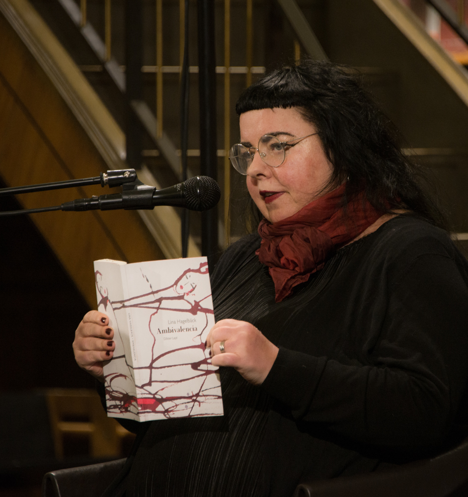 Lina Hagelbäck på Poesimässan på Stockholms Stadsbibliotek den 23 mars 2018.